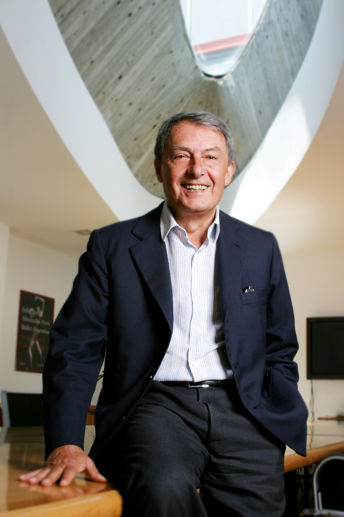 Foto Giorgio Rossi Cairo, Managing Director Value Partners, luglio 2088